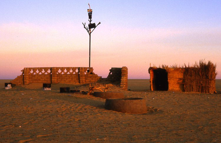 Der neue (stählerne) Arbre du Ténéré in der Ténéré-Wüste ist ein wichtiger Orientierungspunkt im nördlichen Niger. Auch ein Brunnen mit fragwürdiger Wasserqualität befindet sich hier (Betonringe).